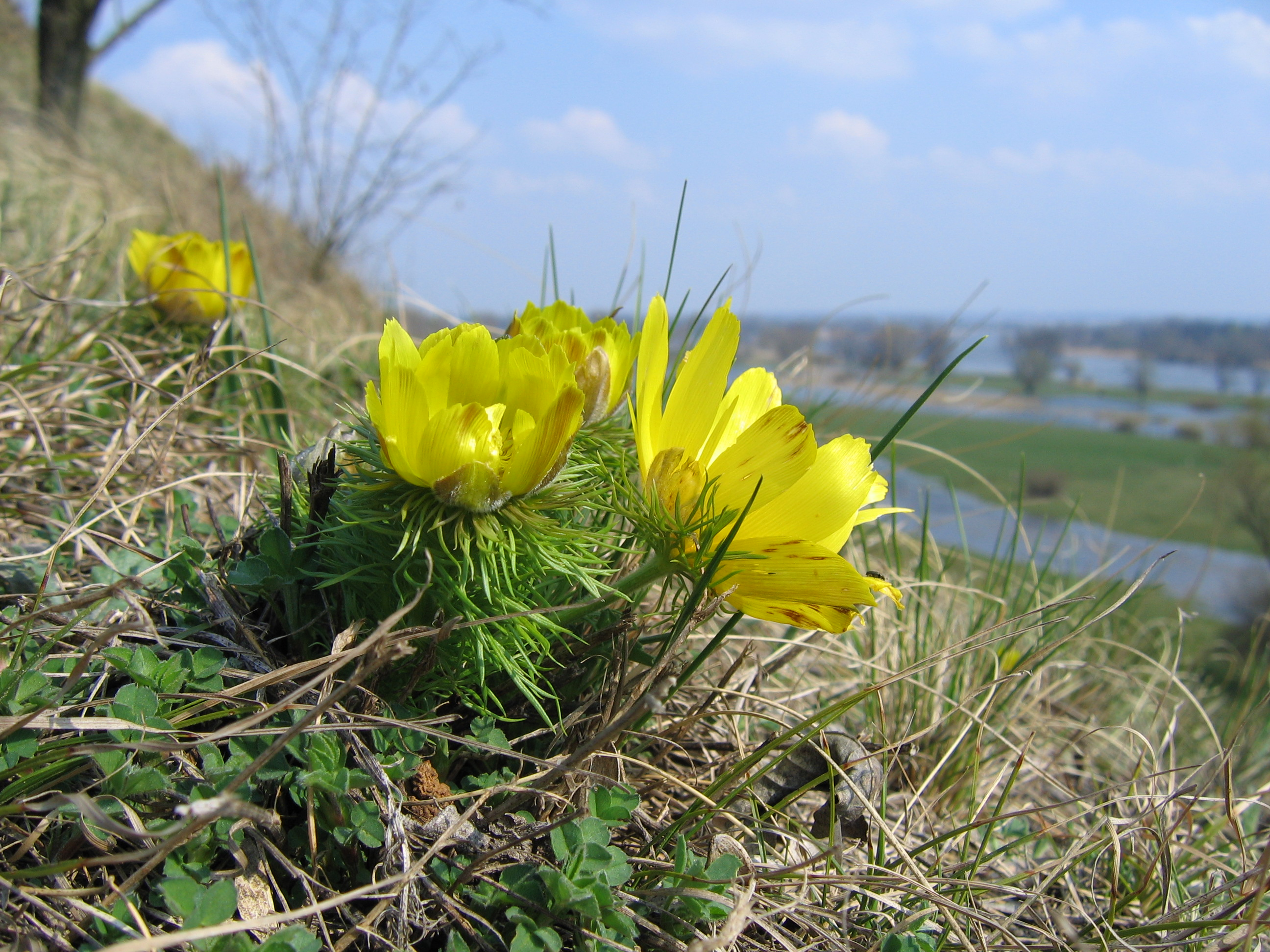 Naturschutzgebiet „Oderberge“ Lebus: Das Frühlingsadonisröschen (Adonis vernalis) kommt in Deutschland nur in wenigen warmen Gegenden mit kontinentalem Klima vor. Die wohl größten Vorkommen gibt es an den Oderhängen zwischen Frankfurt/Oder und Seelow in mehreren Naturschutzgebieten.